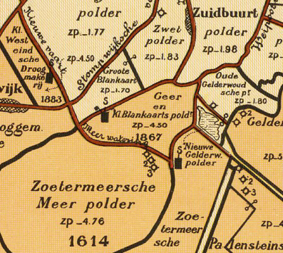 Drooggemaakte_Geer-_en_Kleine_Blankaardpolder